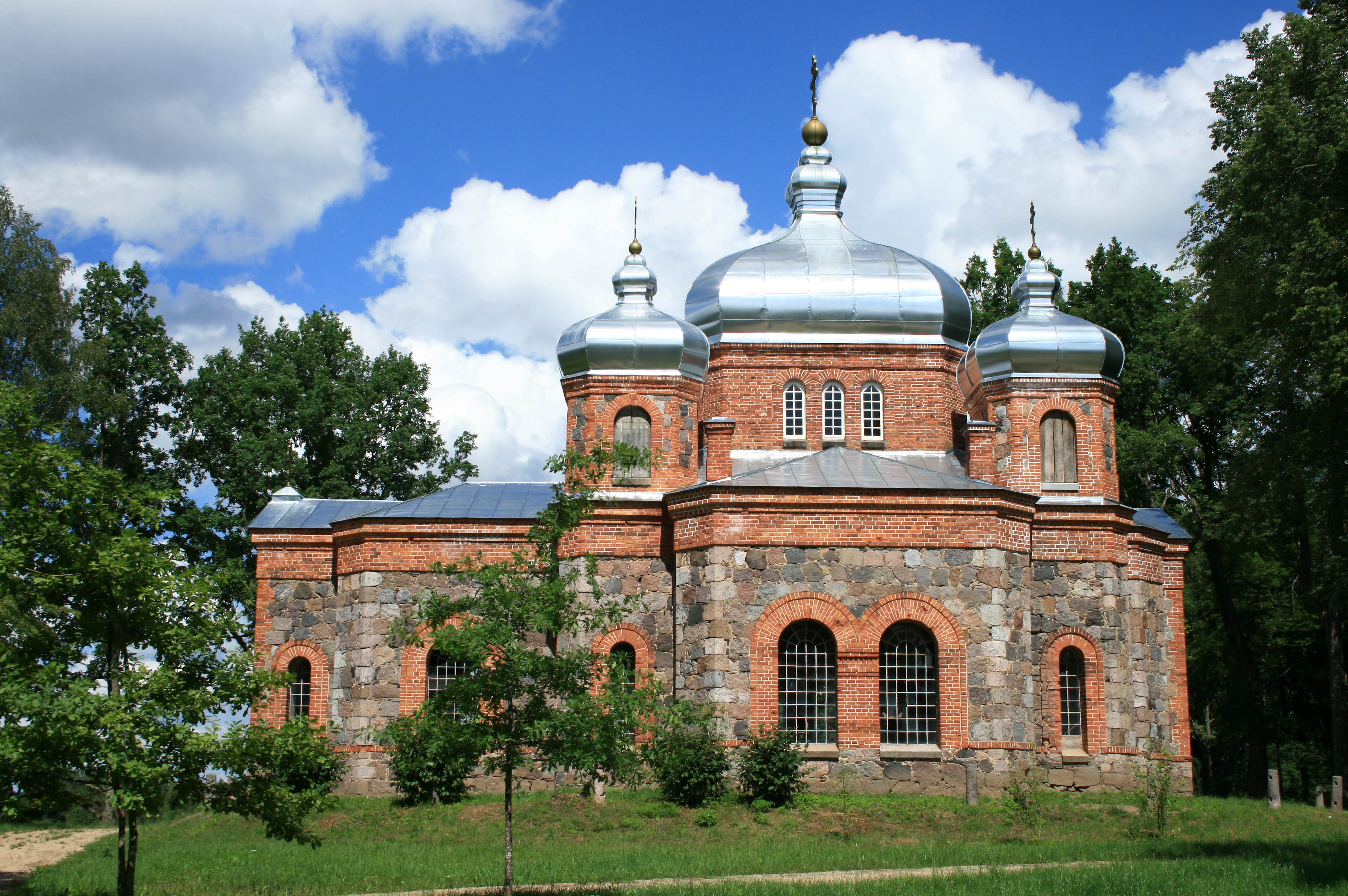 Ilmjärve õigeusu kirik